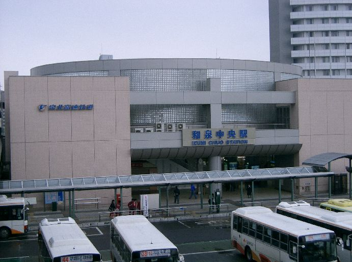 和泉中央駅。